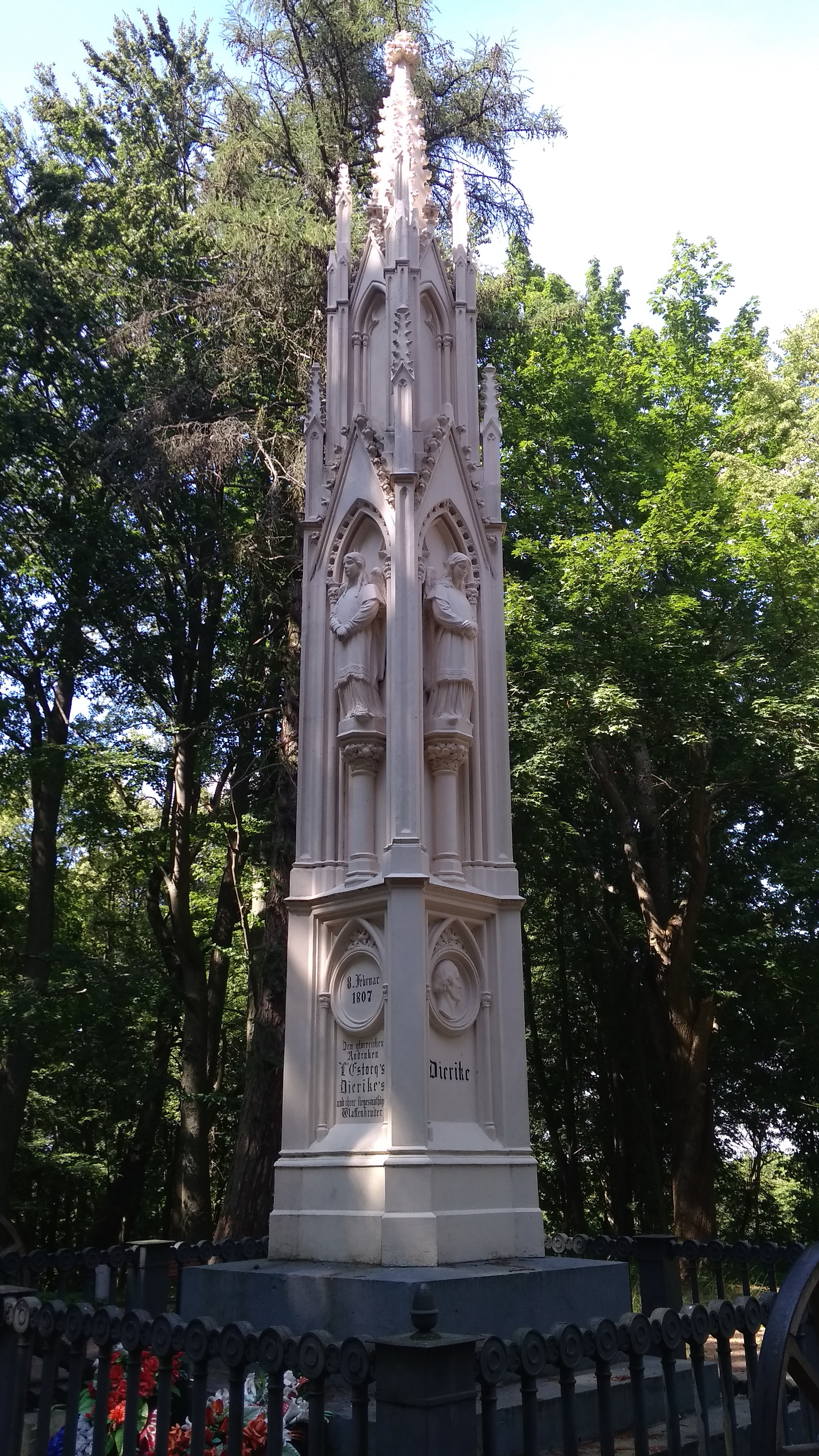 Памятник-обелиск Славы русского оружия: Багратионовск, Калининградская область